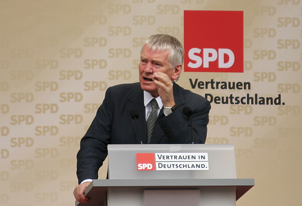 Innenminister Otto Schily bei einer Wahlkampfkundgebung der SPD in München rund eine Woche vor der Bundestagswahl